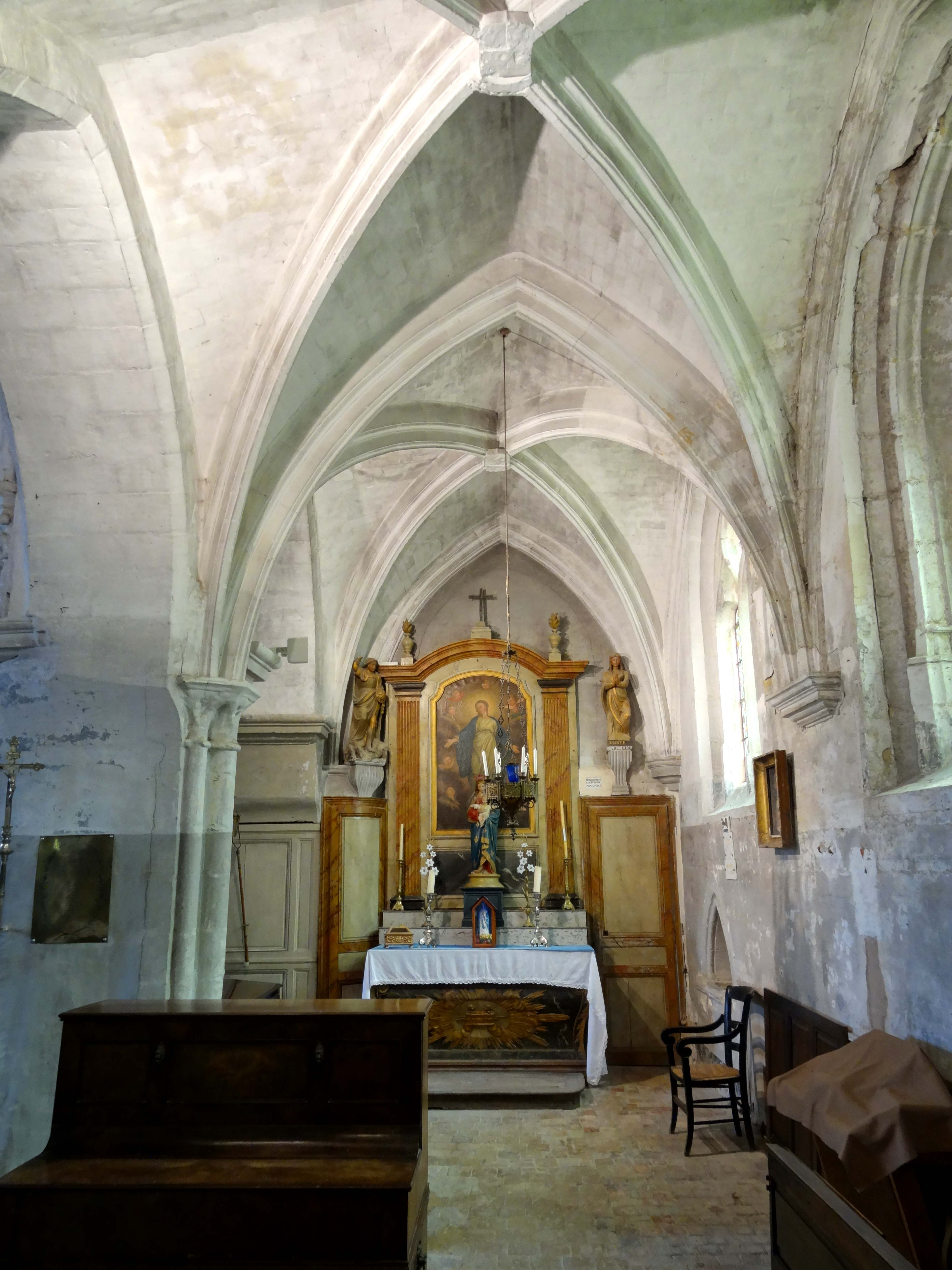 Intérieur de l'église - voir titre.